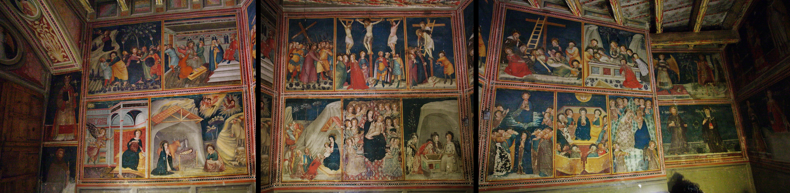 Conjunt d'imatges de la paret esquerra de la cel·la.